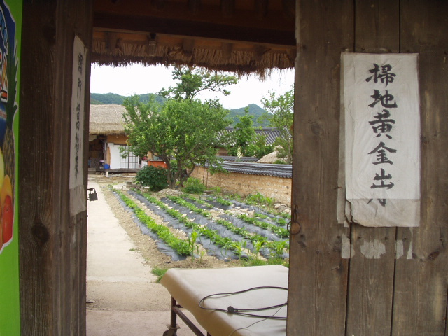 Hahoe Folk Village, Andong, Gyeongsangbuk-do, South Korea